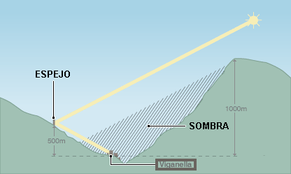 Descripción (Description) Descripcion espejo Viganella Fuente (Source), «trabajo propio». Fecha (Date) 18/12/2006.